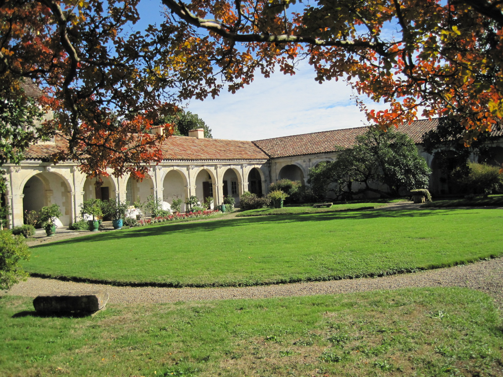 Удмурт: Cour intérieur du château de Gaujacq, vue partielle.